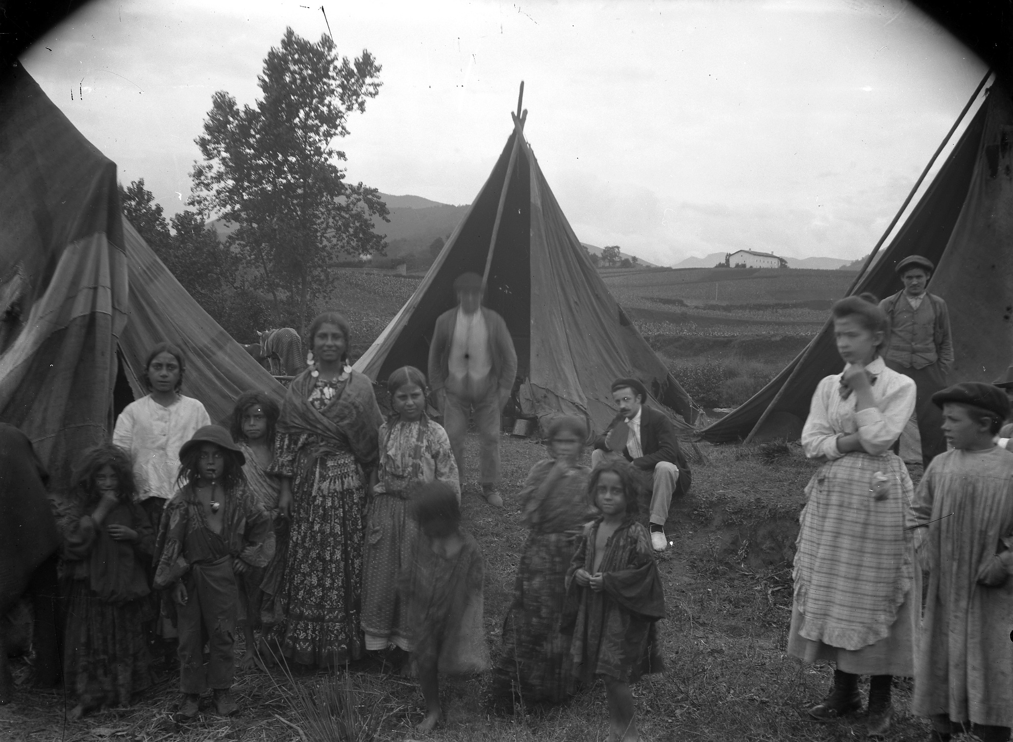 Ijito talde bat Tolosan, 1899an